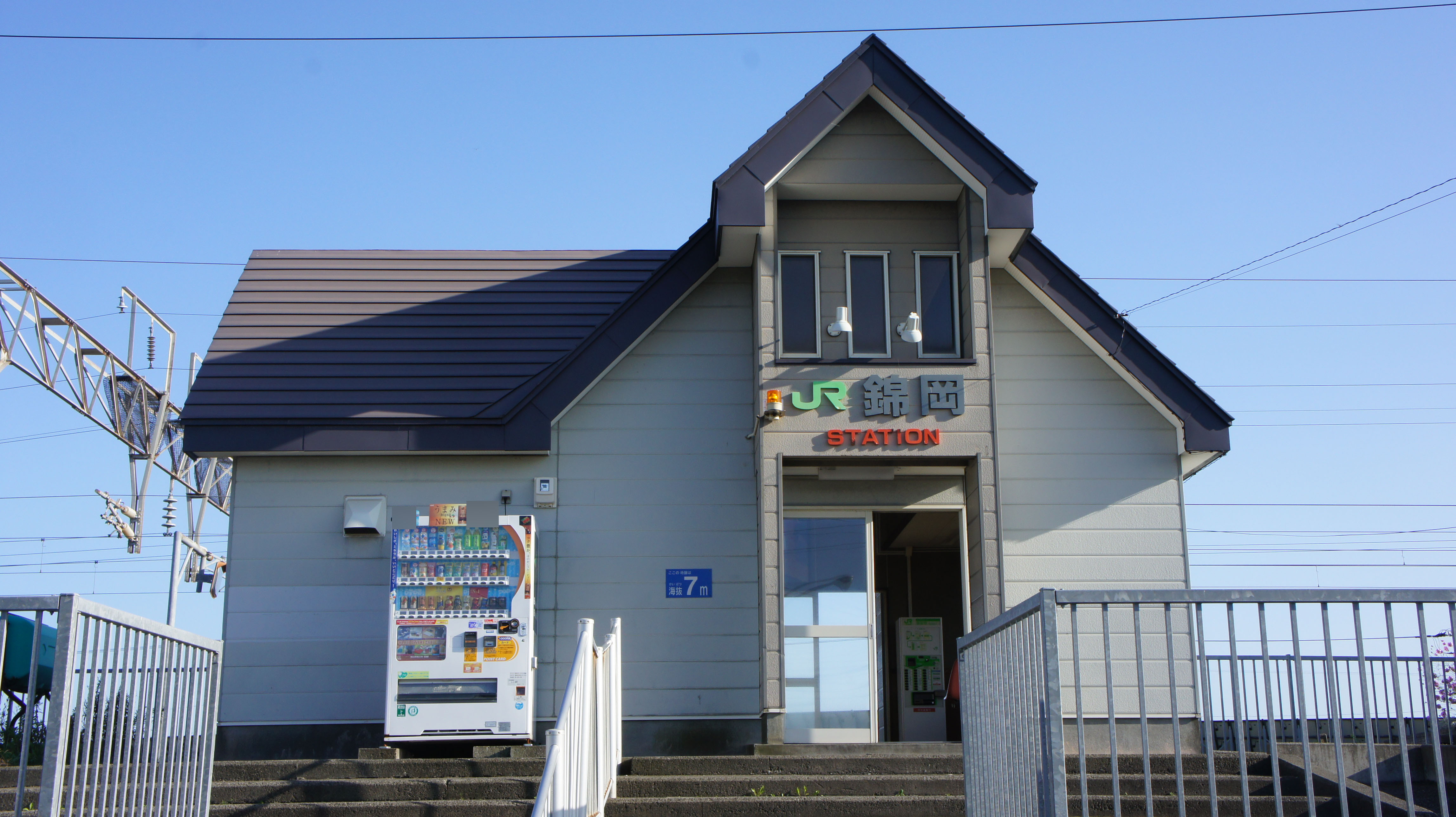 JR室蘭本線・錦岡駅の駅舎